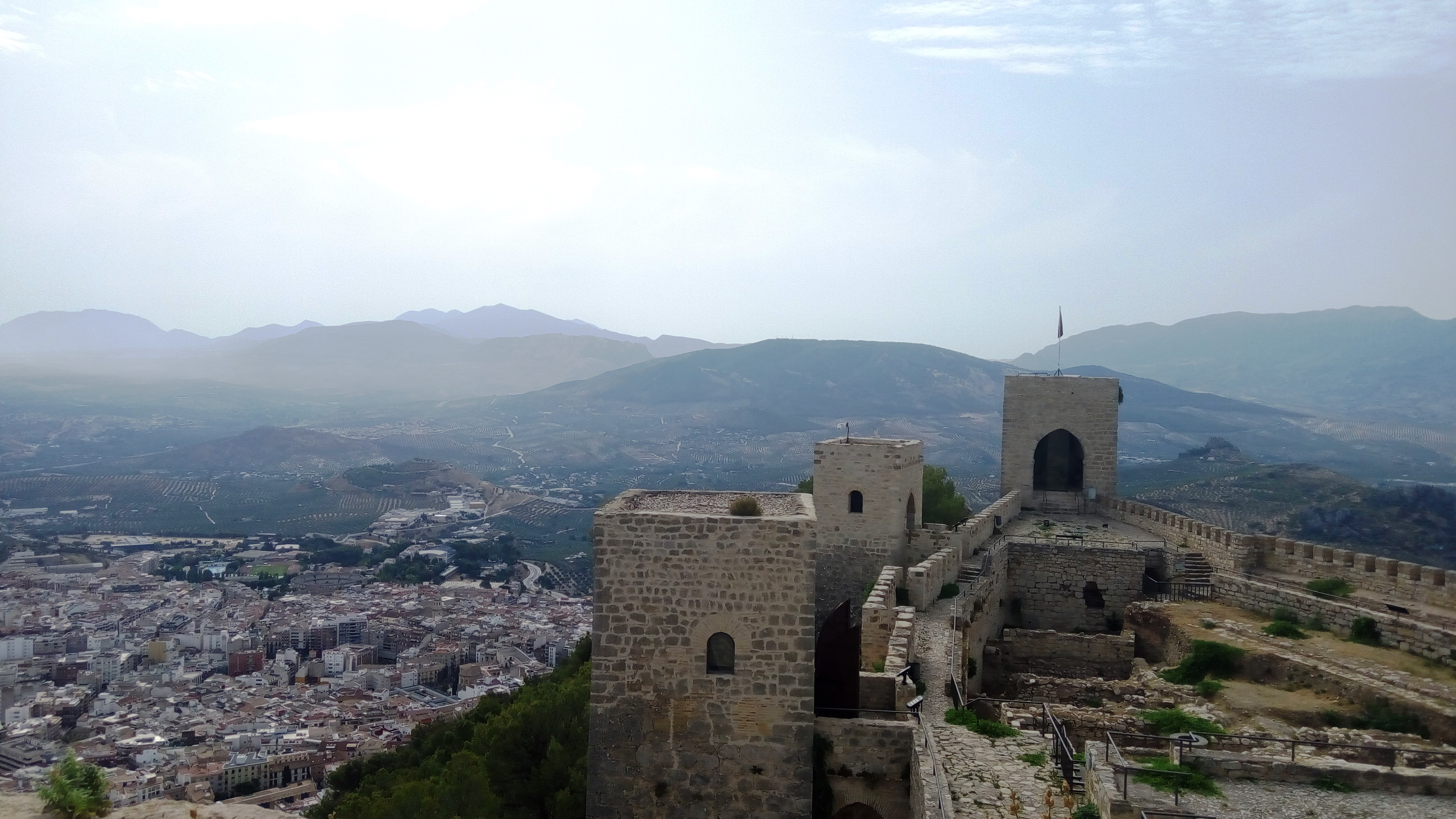 Замъкът Санта Каталина, Хаен, Андалусия